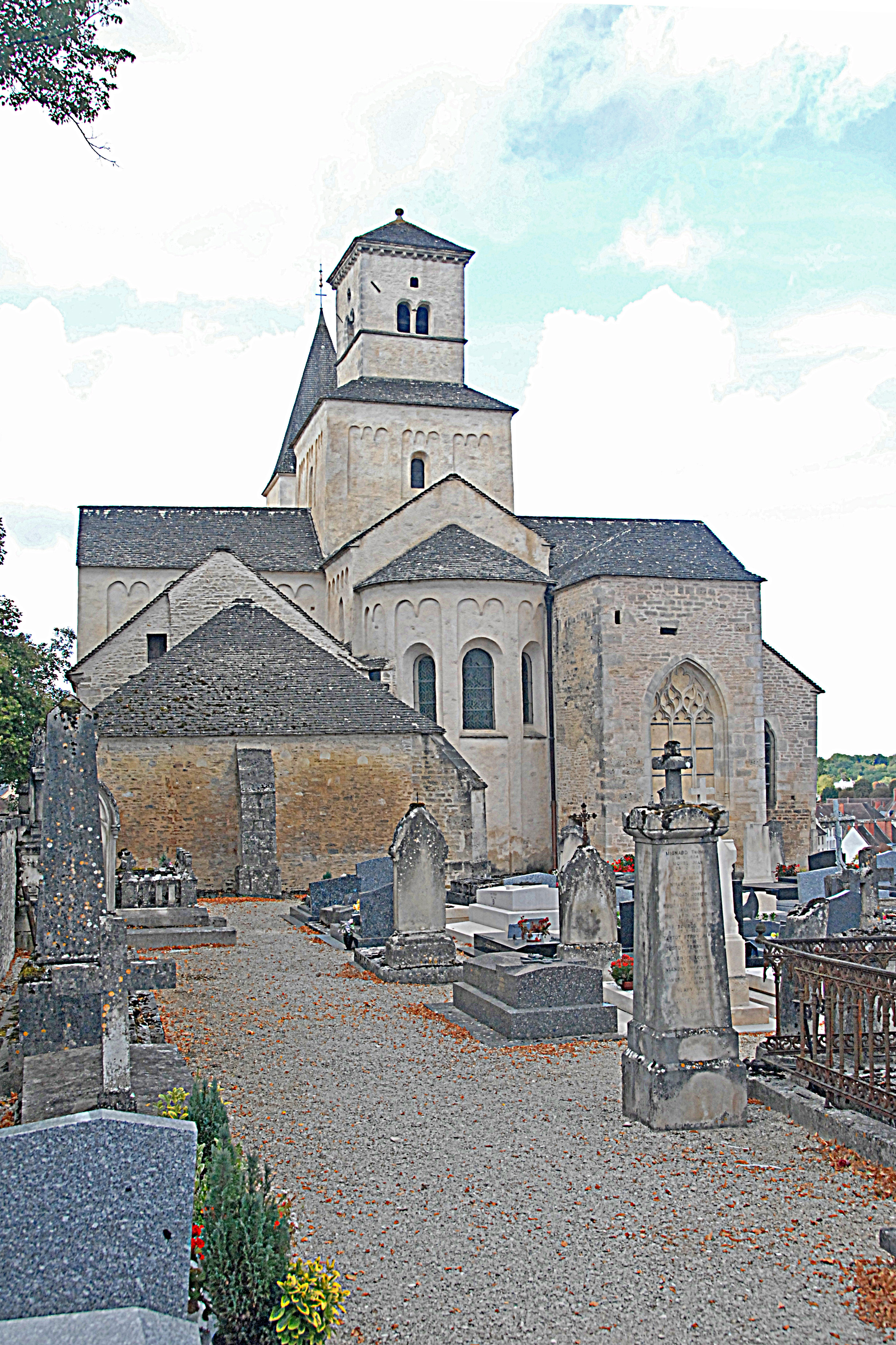 St-Vorles de Châtillon-sur-Seine, Chorhaupt von NO